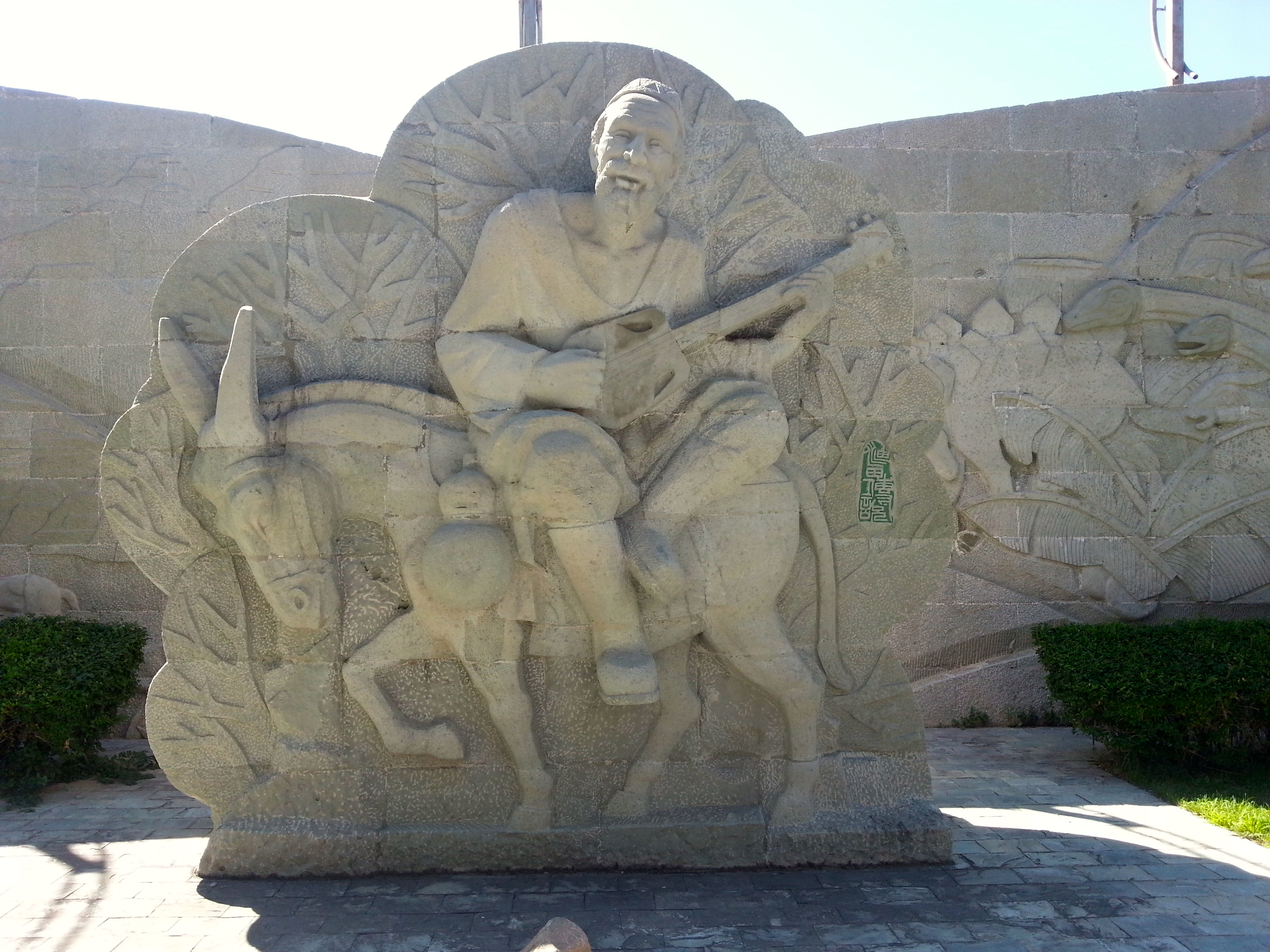 Salim er regnet som oppdager av «Black Oil Mountain» i nærheten av Karamay by.